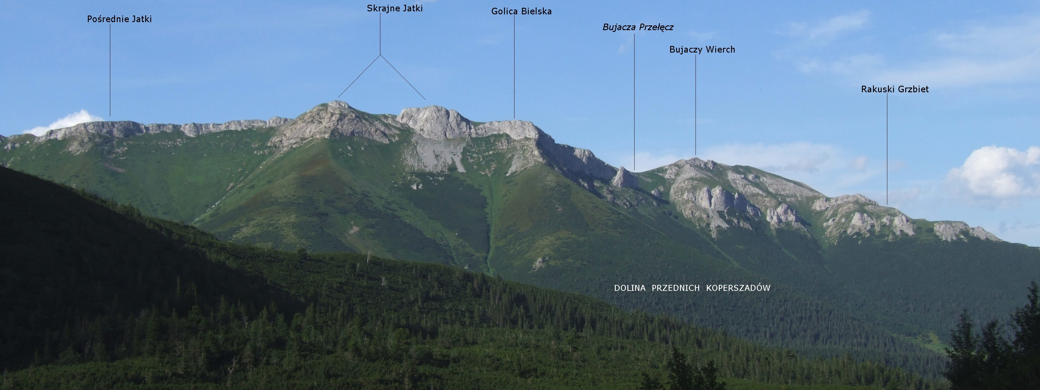 Wschodnia część Tatr Bielskich, widok z południowej strony